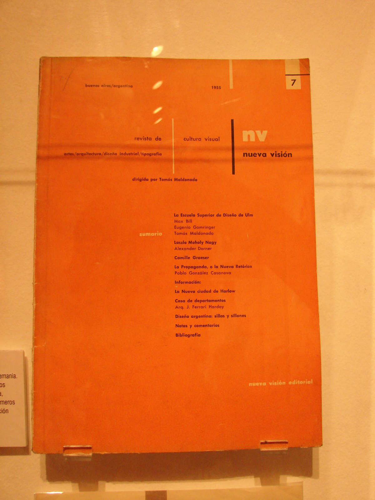 Exposición en el museo de la portada de Nueva Visión de Tomás Maldonado, publicada en 1955.